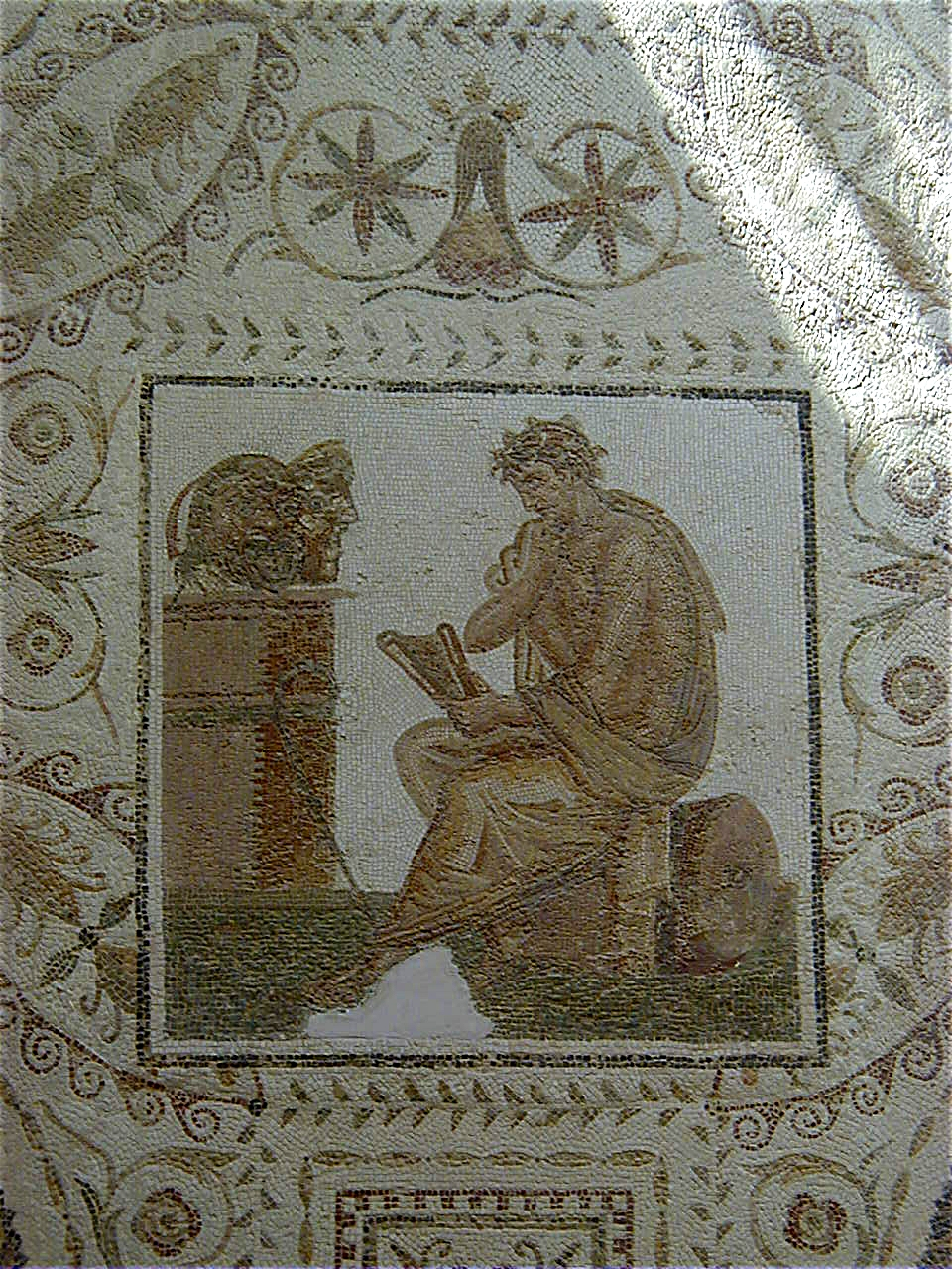 Poète aux masques de théâtre